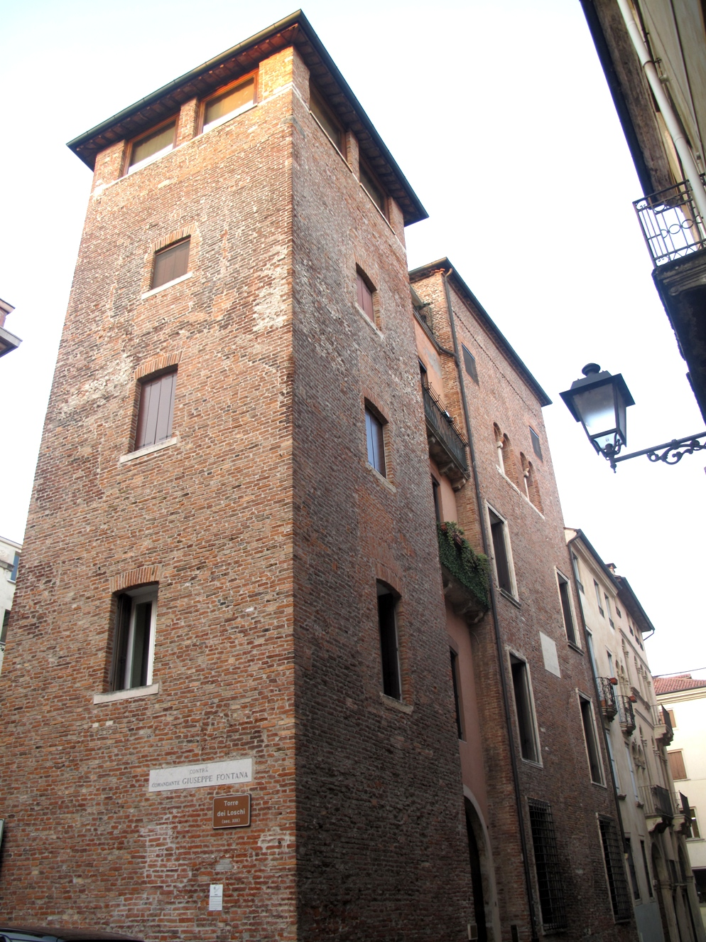 Case-torri medievali, in contrà S.Antonio a Vicenza